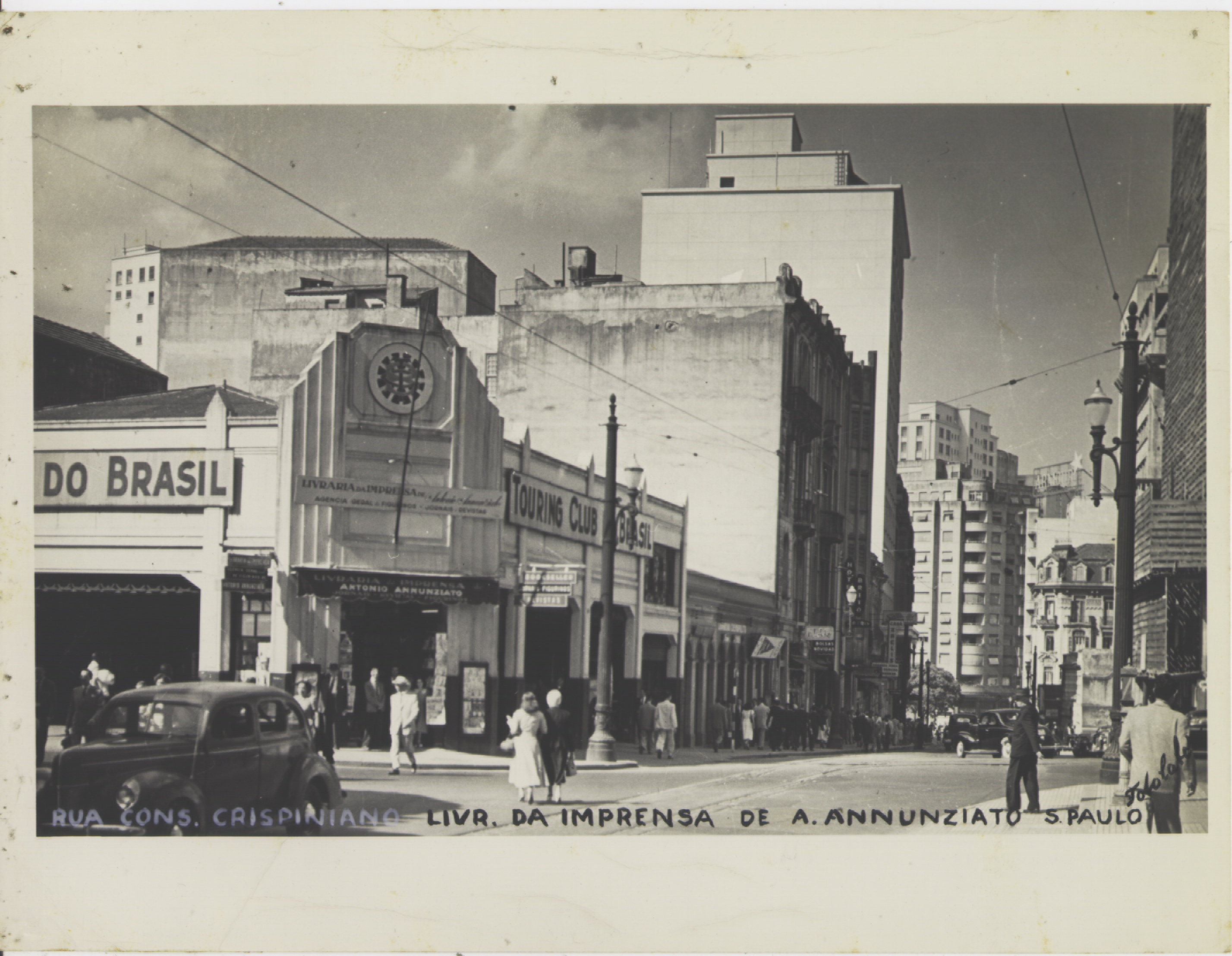 Obra que integra o acervo do Museu Paulista da USP. Coleção Werner Haberkorn